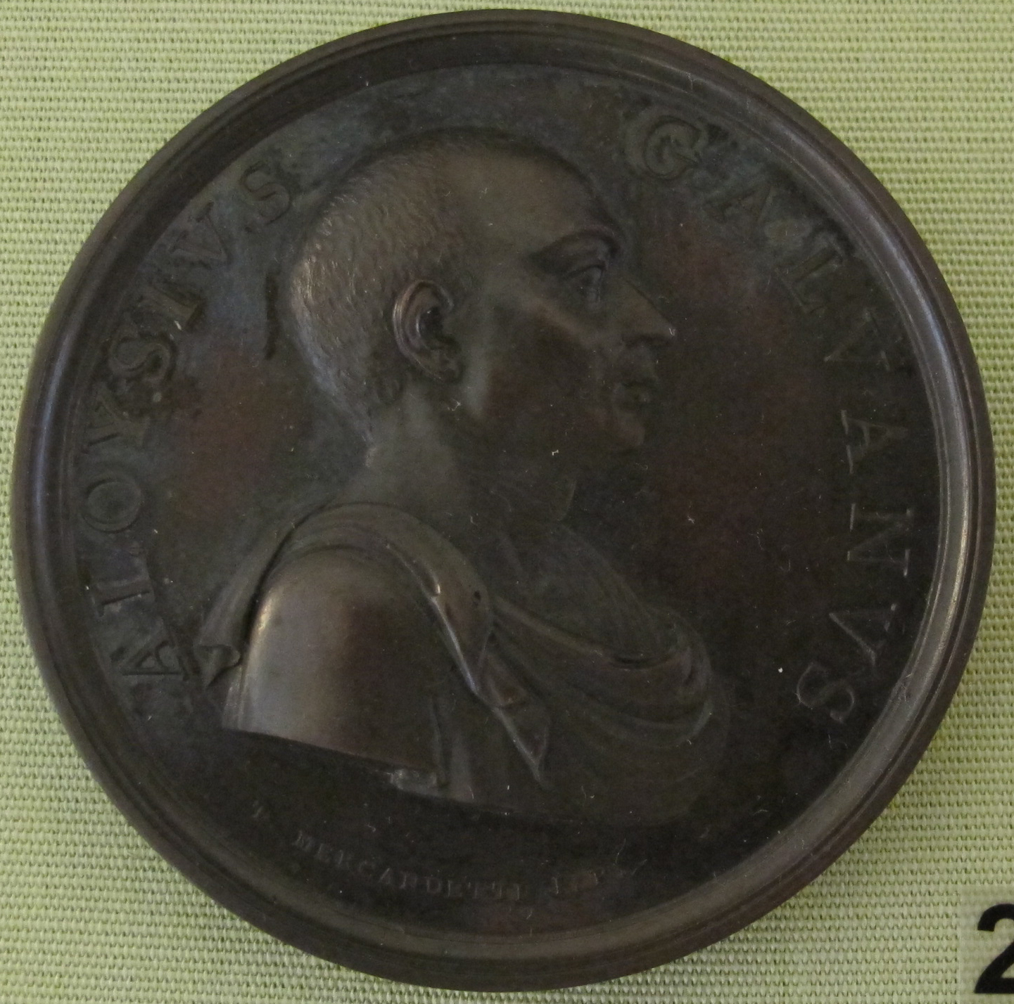 Luigi Galvani, 1822